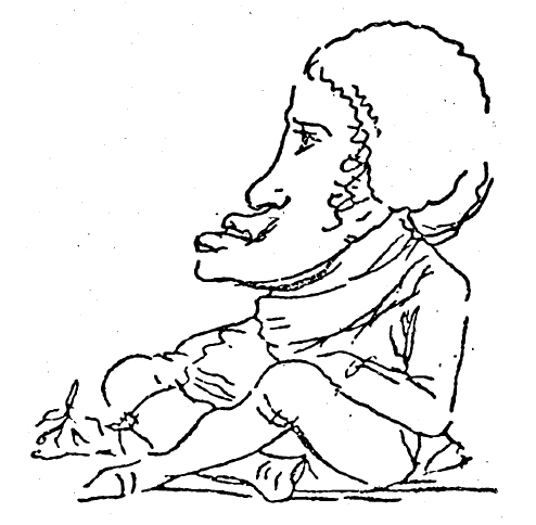 Autorretrato caricaturesco de Francisco de Goya, dibujado en una de sus cartas a Martín Zapater. En él se dibuja chato, como se describe a sí mismo en su epistolario, oponiéndose a Martín Zapater a quien describe como aguileño. Cfr. Francisco de Goya, Cartas a Martín Zapater, ed. lit. Mercedes Águeda y Xavier de Salas, Tres Cantos (Madrid), Istmo, 2003, págs. 344-348. ISBN 978-84-7090-399-1.